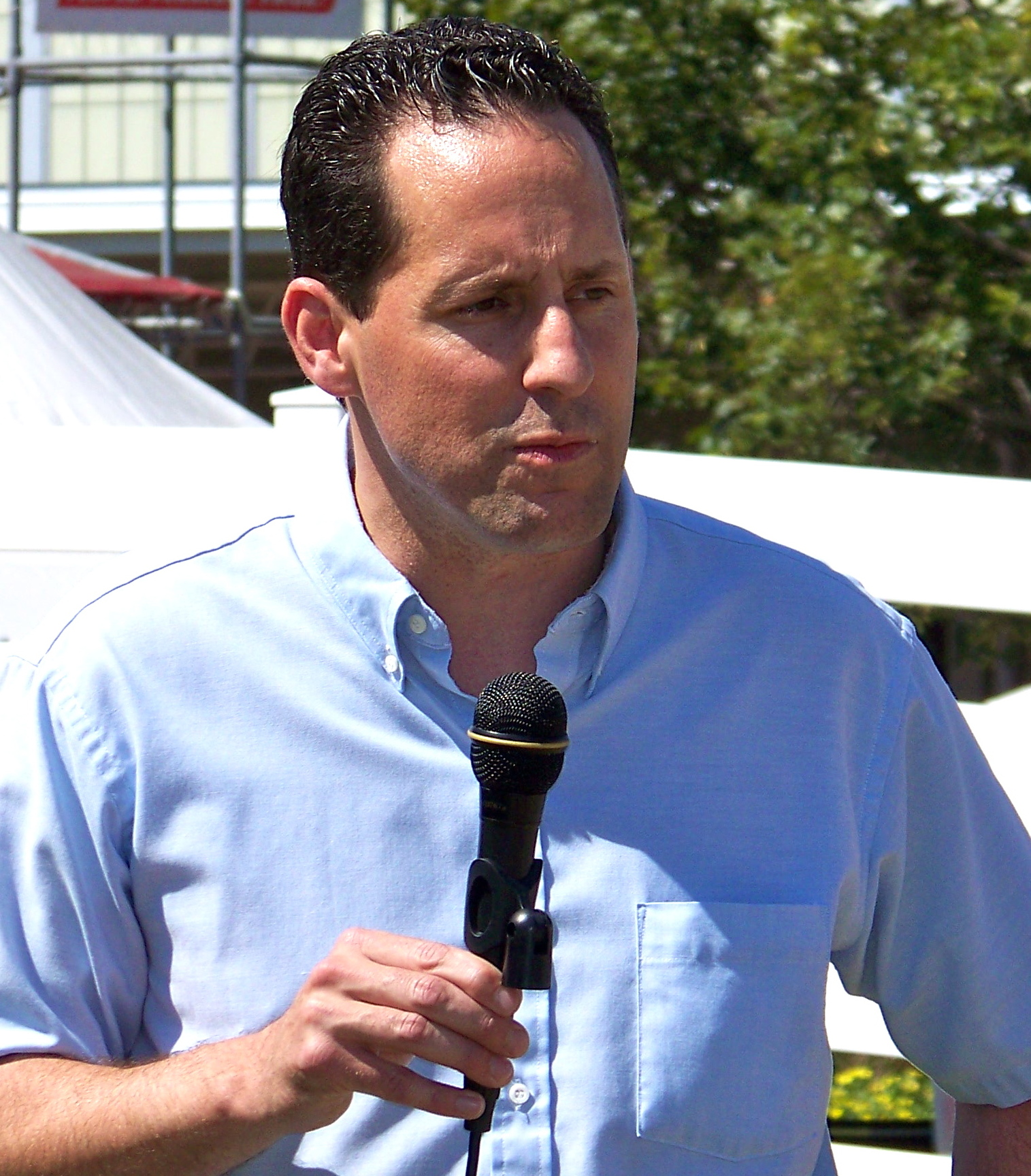 Campbell